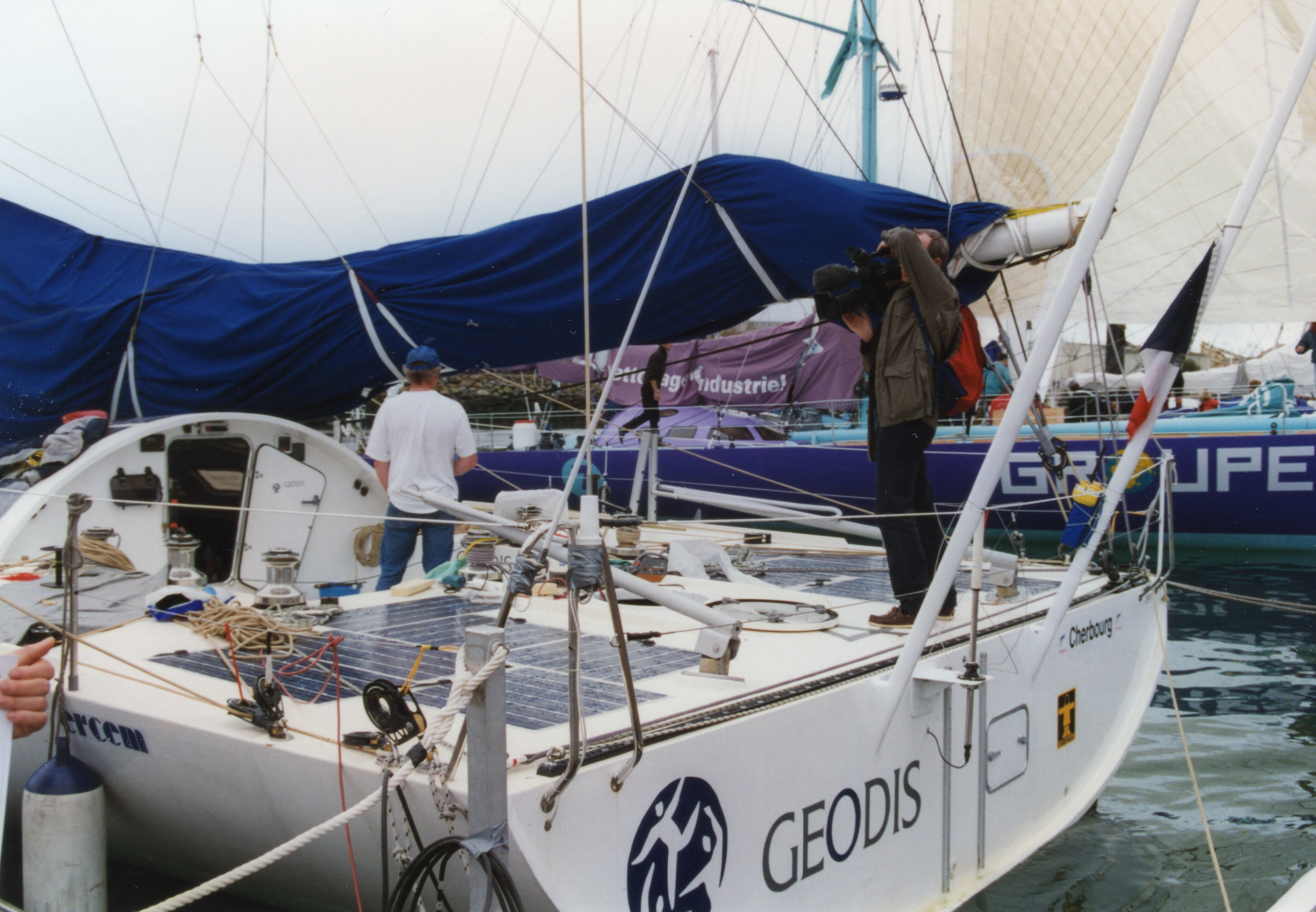 Géodis bateau de Christophe Auguin au départ du Vendée Globe 1996-1997